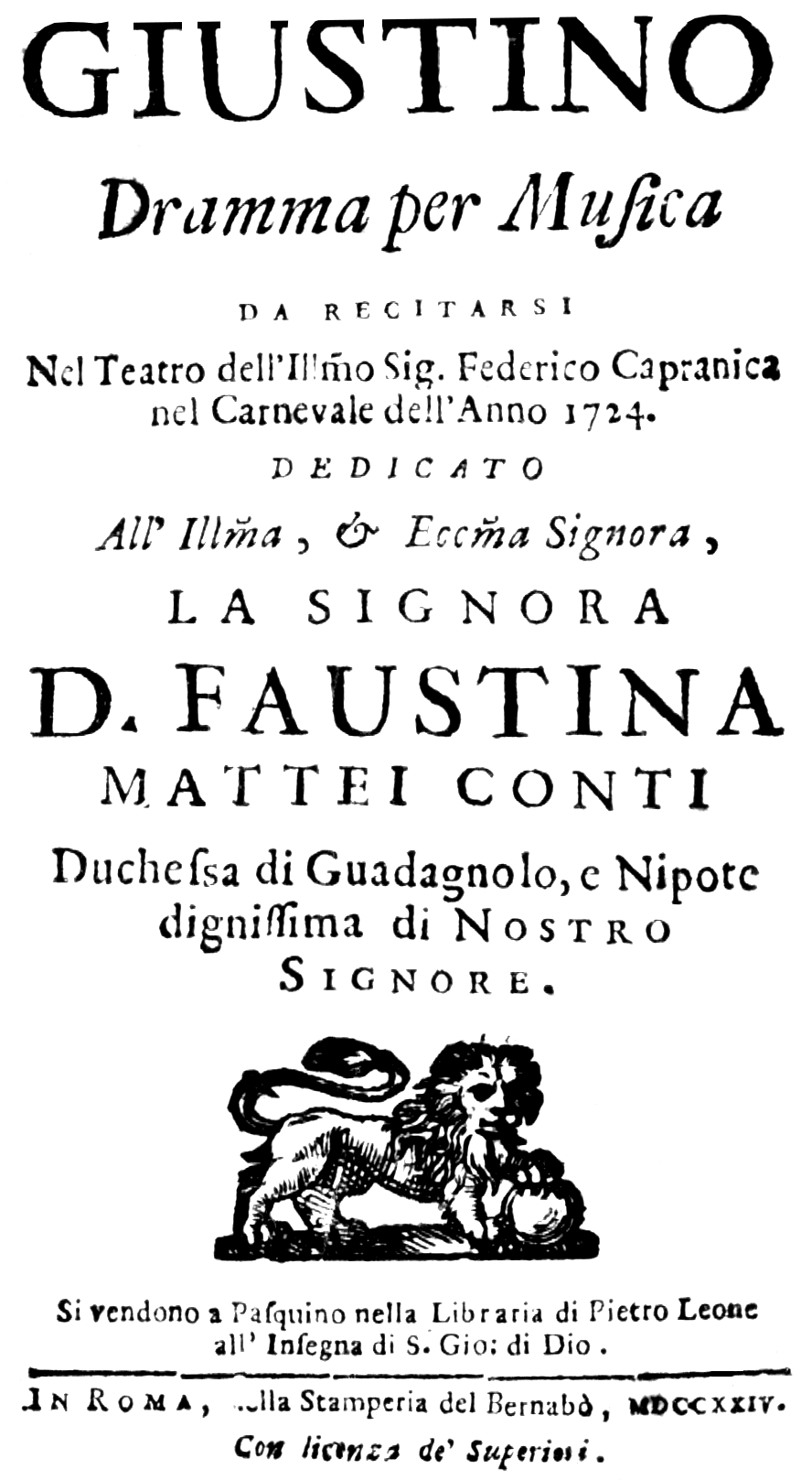 Vivaldi - Giustino - title page of the libretto - Rome 1724